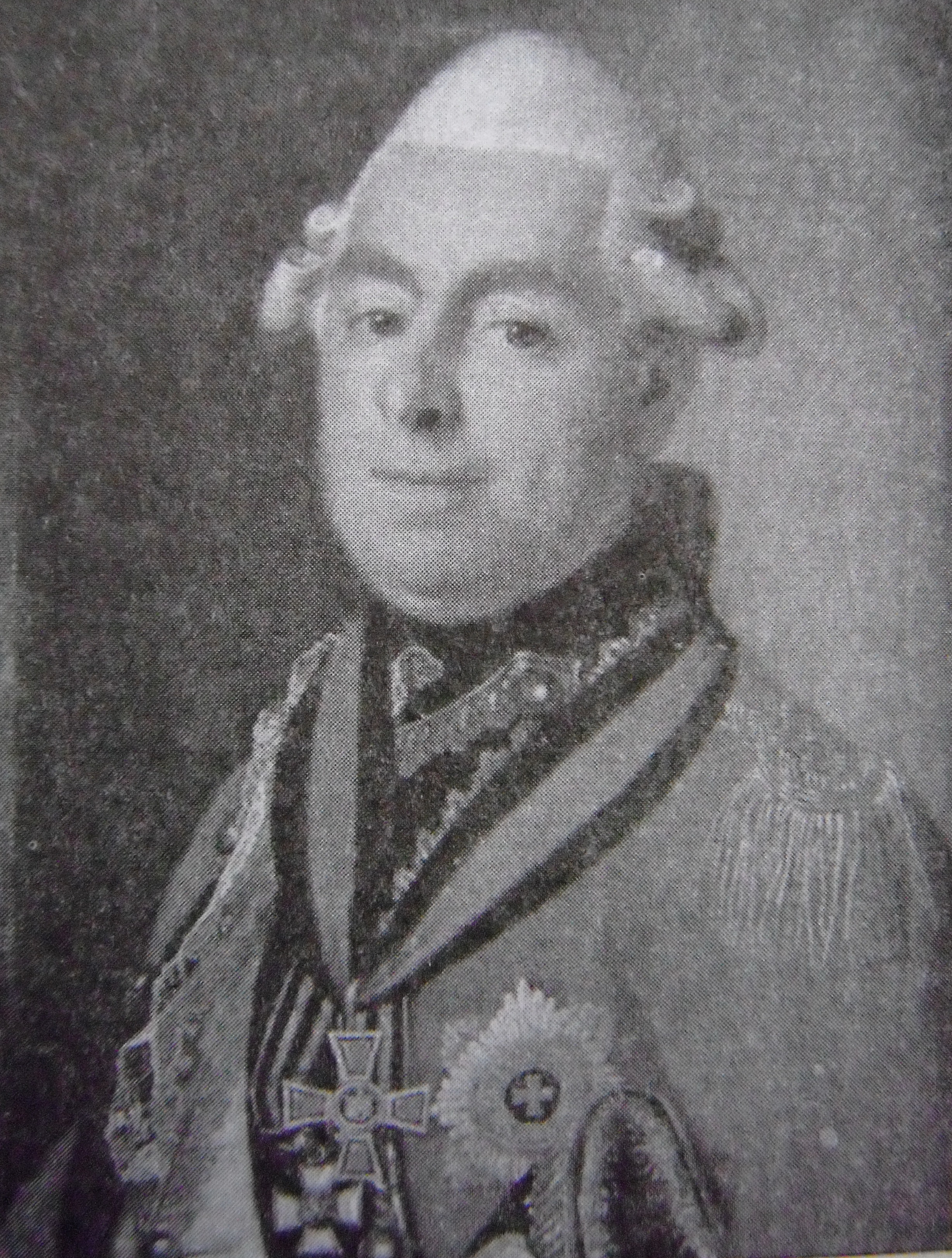 Портрет управляющего Сестрорецкого оружейного завода Бригмана от 1780 года. Участвовал в военных действиях в Крыму и на Кубани. В период русско-турецкой войны 1768-1774 гг. отличился при взятии Бендер. В 1778 г. служил под началом Суворова. Принимал участие в войне со шведами в 1789 г. За отличие был награждён орденами св. Георгия 4-й степени и св. Владимира 2-й степени. В должности командующего сестрорецким заводом завершил ремонт корпусов и замену оборудования, достроил лазарет и жилые дома для офицеров нижних чинов. В 1793 году в звании генерал-поручика уволился по состоянию здоровья.